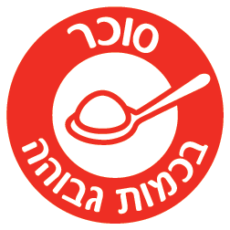 הסמל האדום שיוצג על מוצרי מזון בעלי כמות סוכר גבוהה על ידי משרד הבריאות